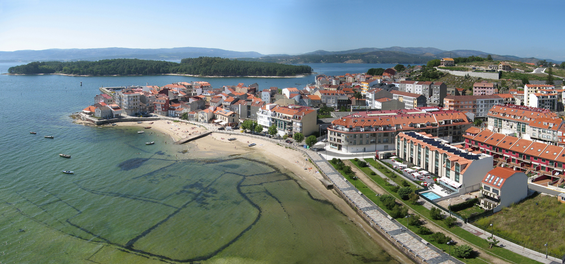 Vista aérea do Carril, Vilagarcía de Arousa